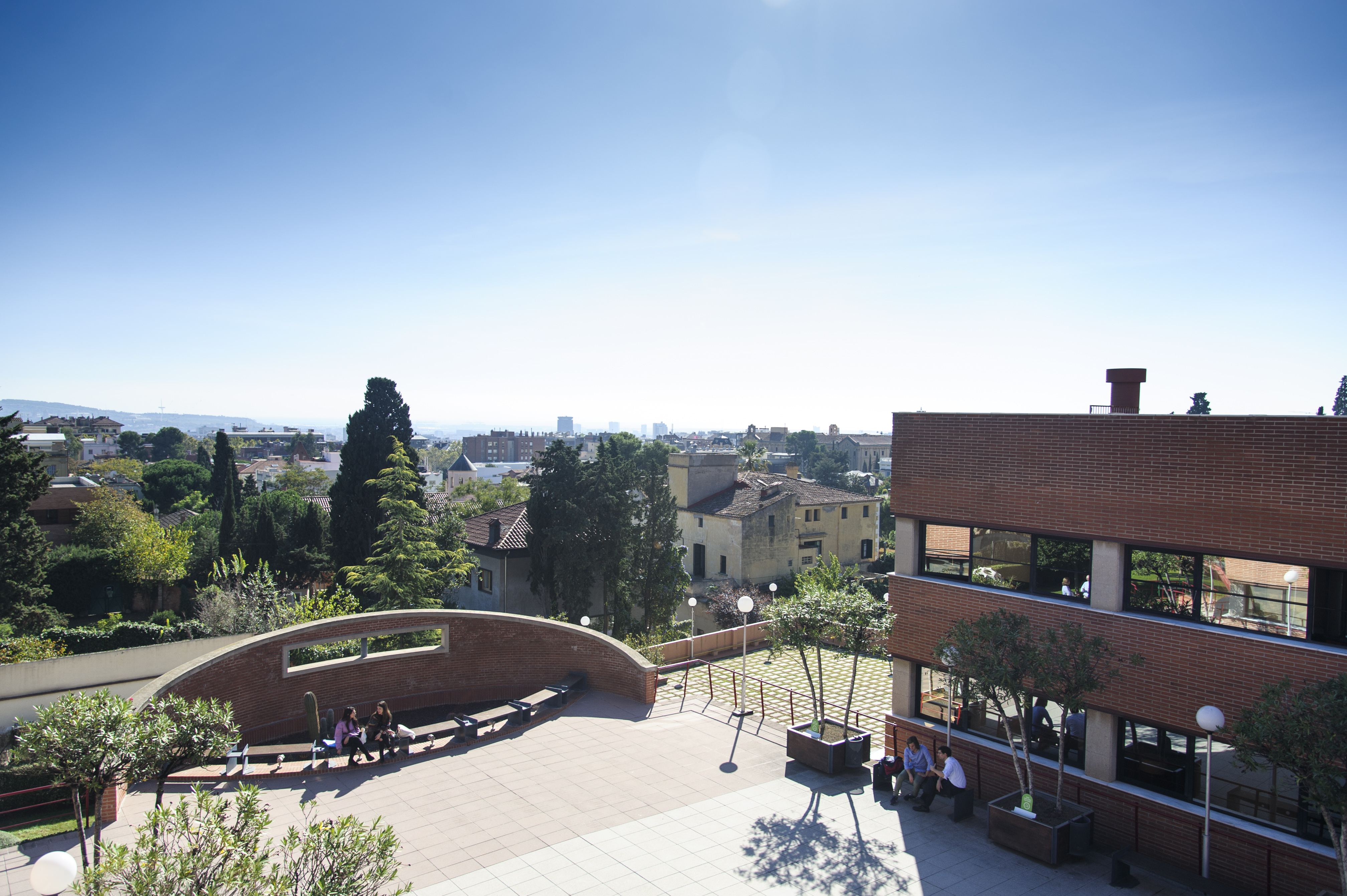 Campus Barcelona de la Universitat Internacional de Catalunya